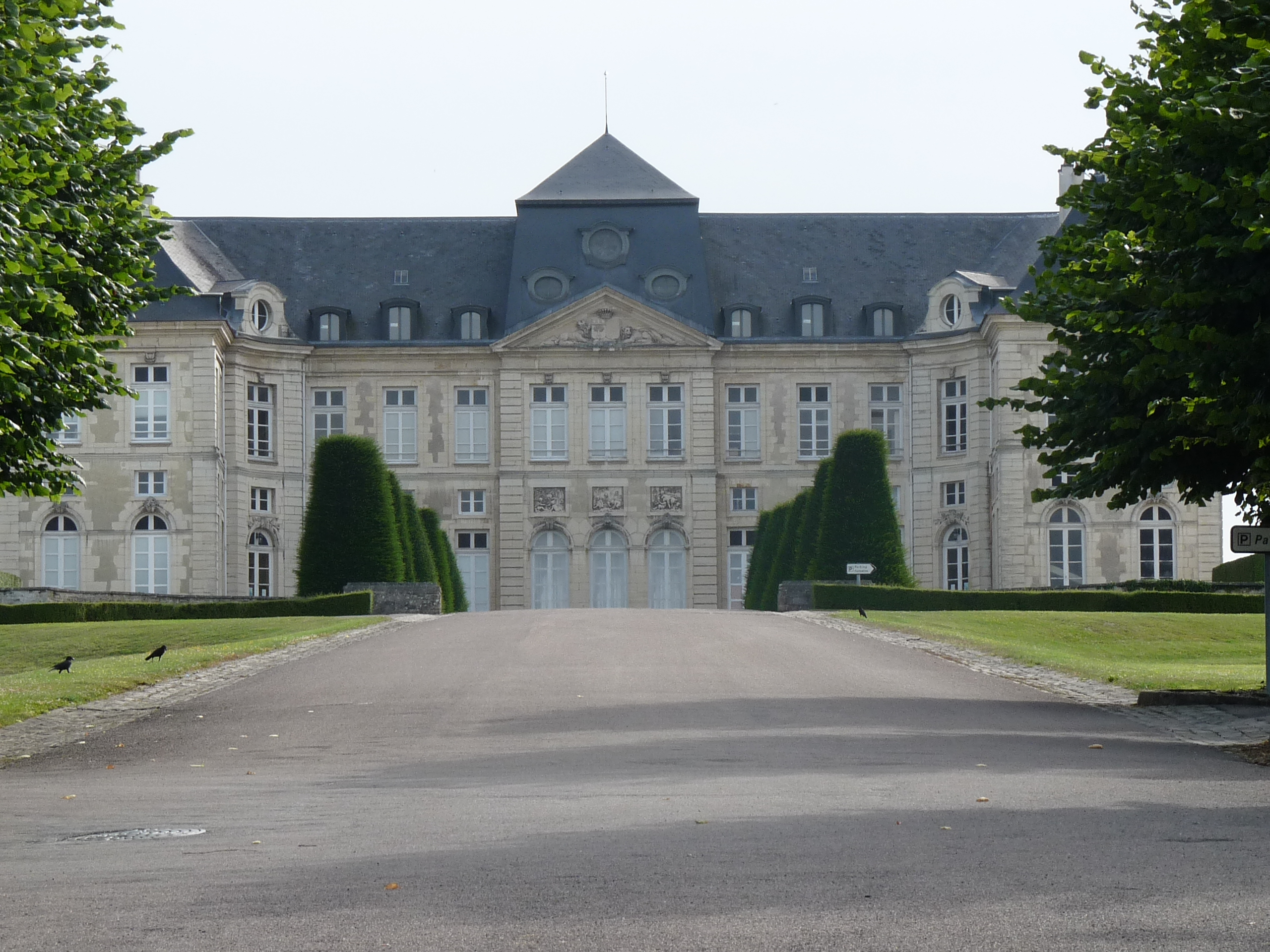 Auffahrt zum Schloss Brienne, Frankreich